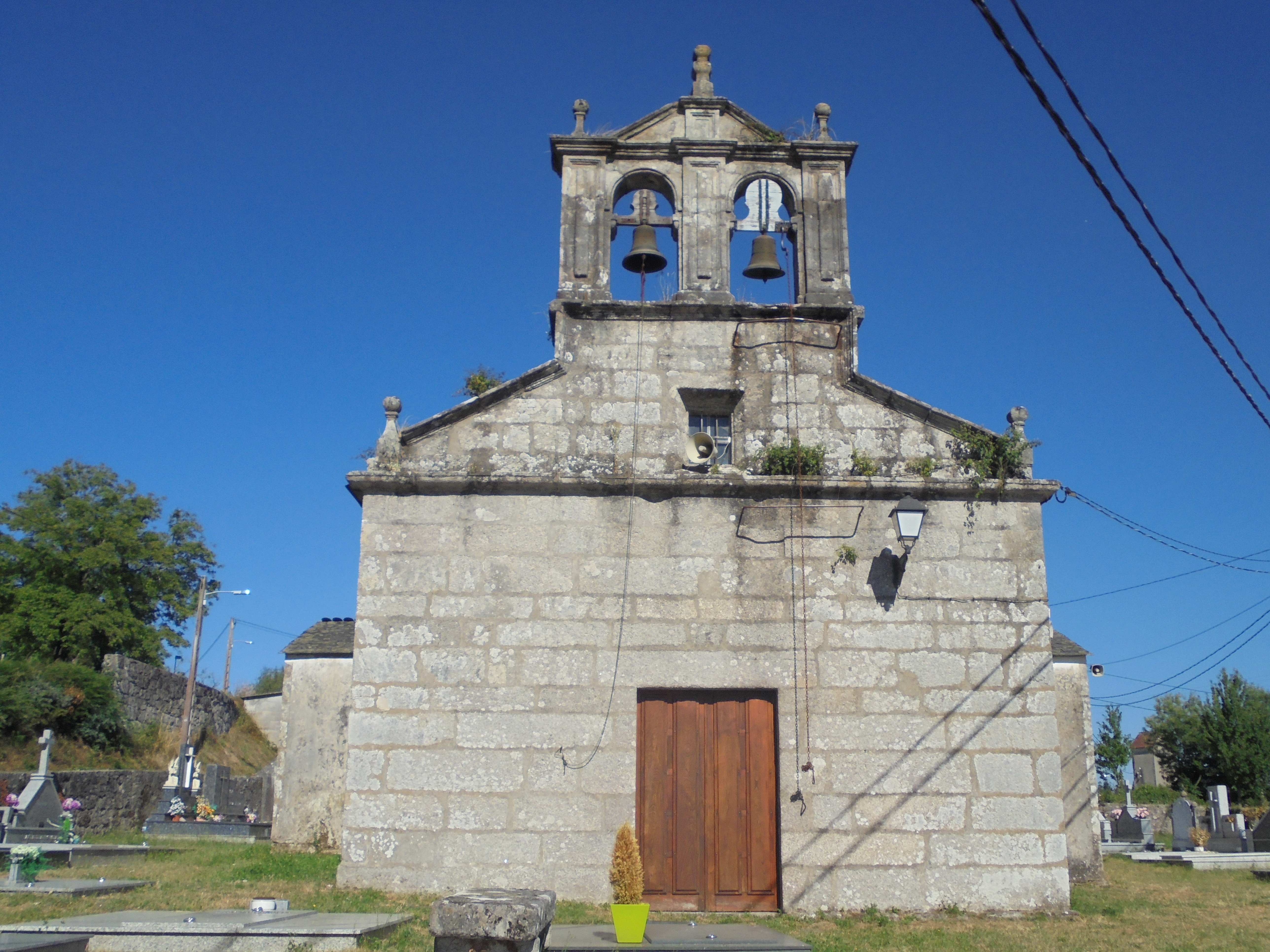 Igrexa parroquial de Romeán ( Lugo)